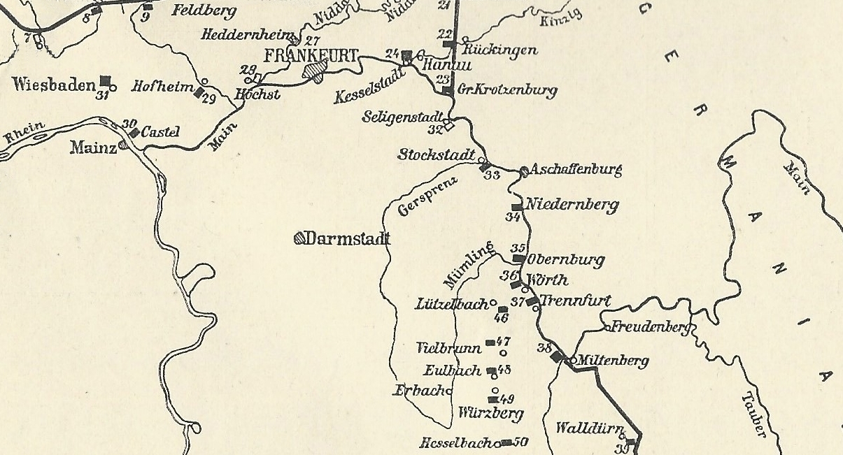 Übersichtskarte des obergermanischen und raetischen Limes (Ausschnitt)